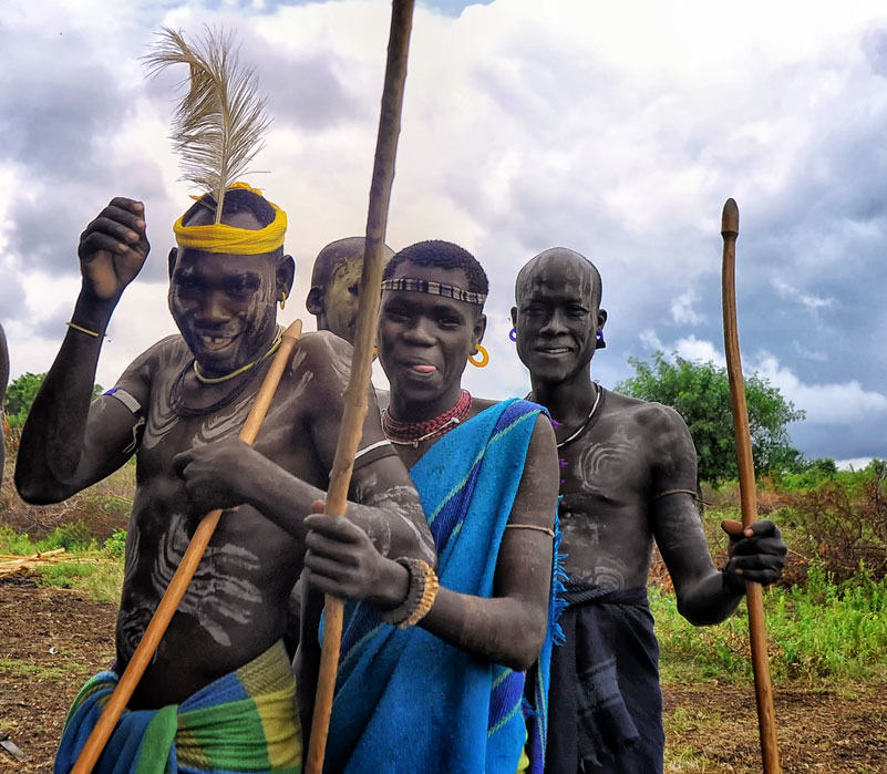 Jinka